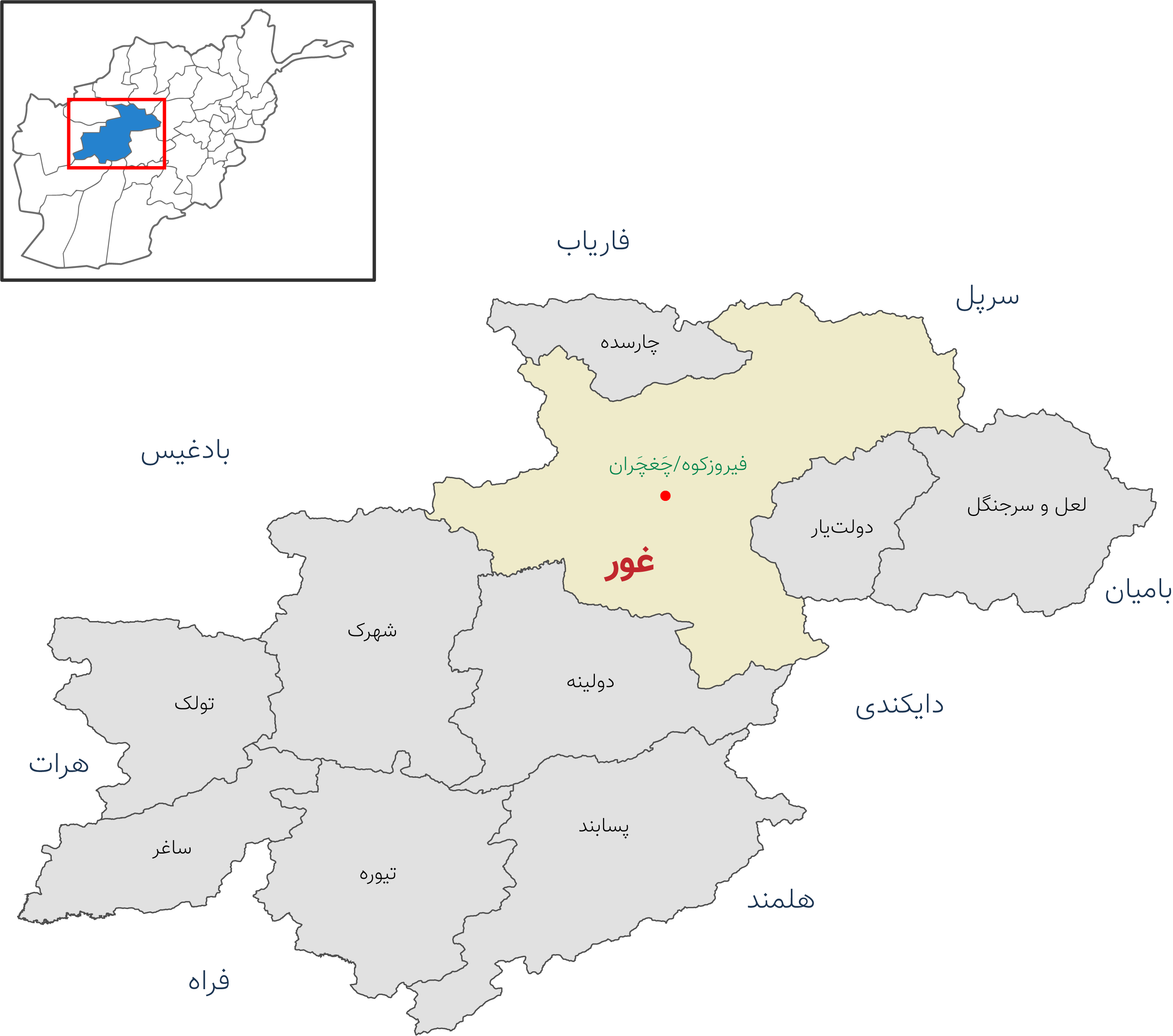 نقشه ولایت غور